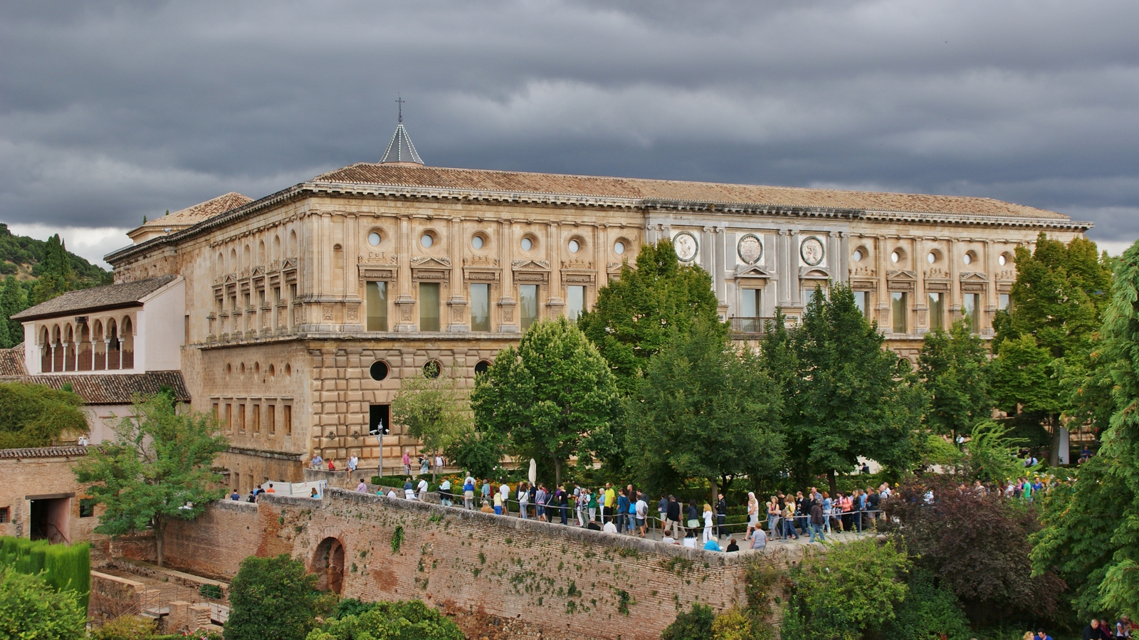 Palacio del Emperador Carlos V, estilo manierista siglo XVI. Fue mandado construir por emperador en 1527, en la colina de la Alhambra para establecer su residencia. La Alhambra, Granada, Comunidad Autónoma de Andalucía